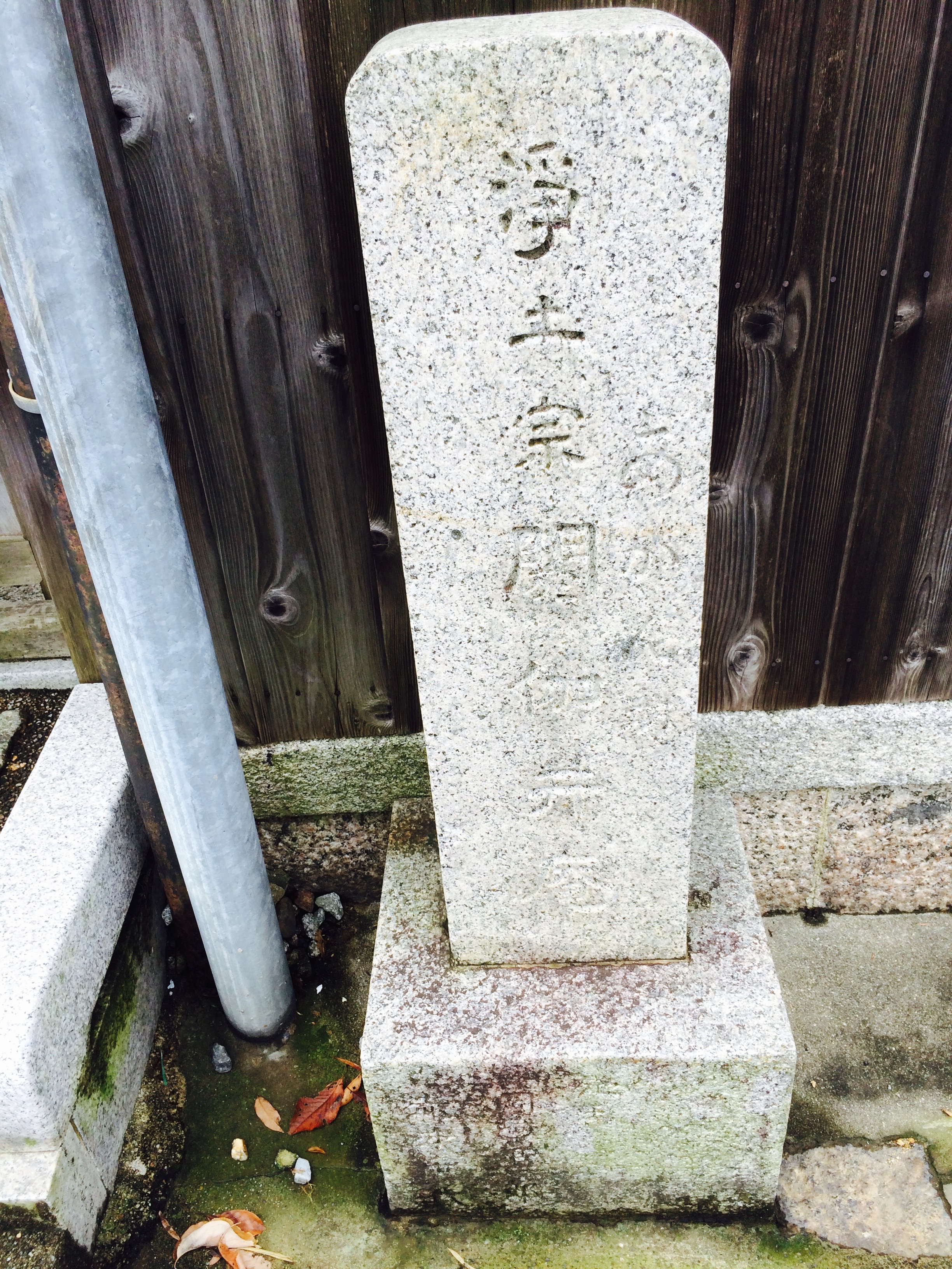 奈良高畑町 閼伽井庵前 あかん坊の石碑